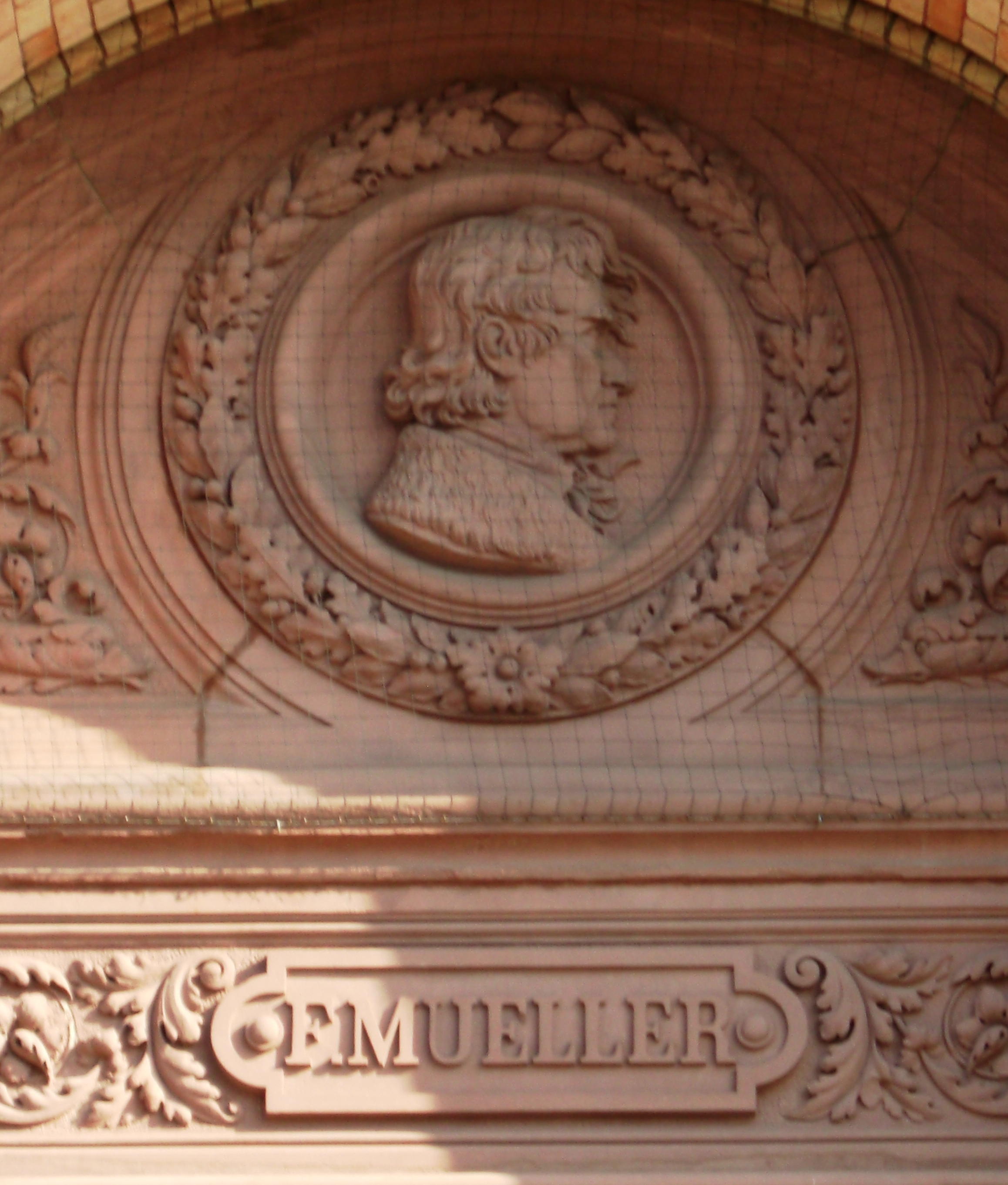 Medaillon von Ferdinand Müller (1809-1881), Bildhauer; Kunsthalle Hamburg This is a photograph of an architectural monument.